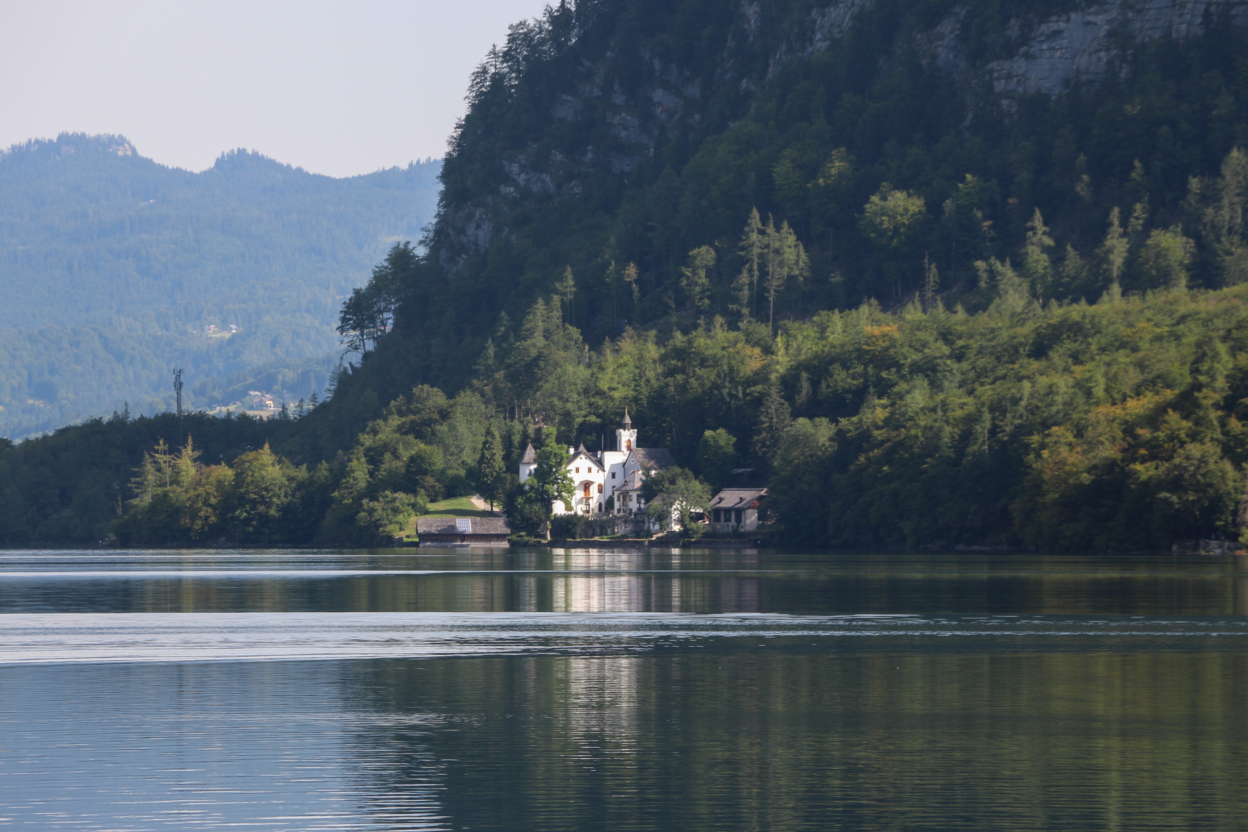 Schloß Grub (Obertraun)